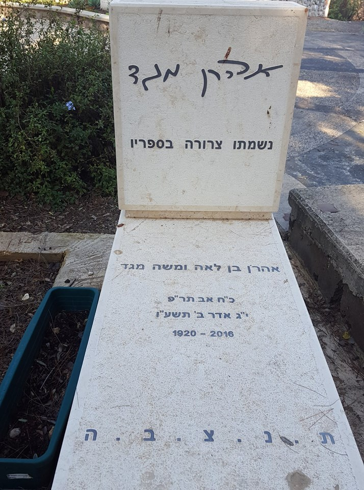 קברו של הסופר אהרון מגד בבית הקברות כנרת צילום :אלי אלון